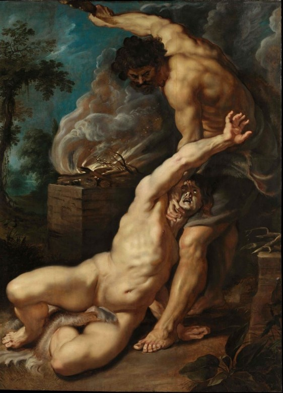 Cain slaying Abellabel QS:Len,"Cain slaying Abel"